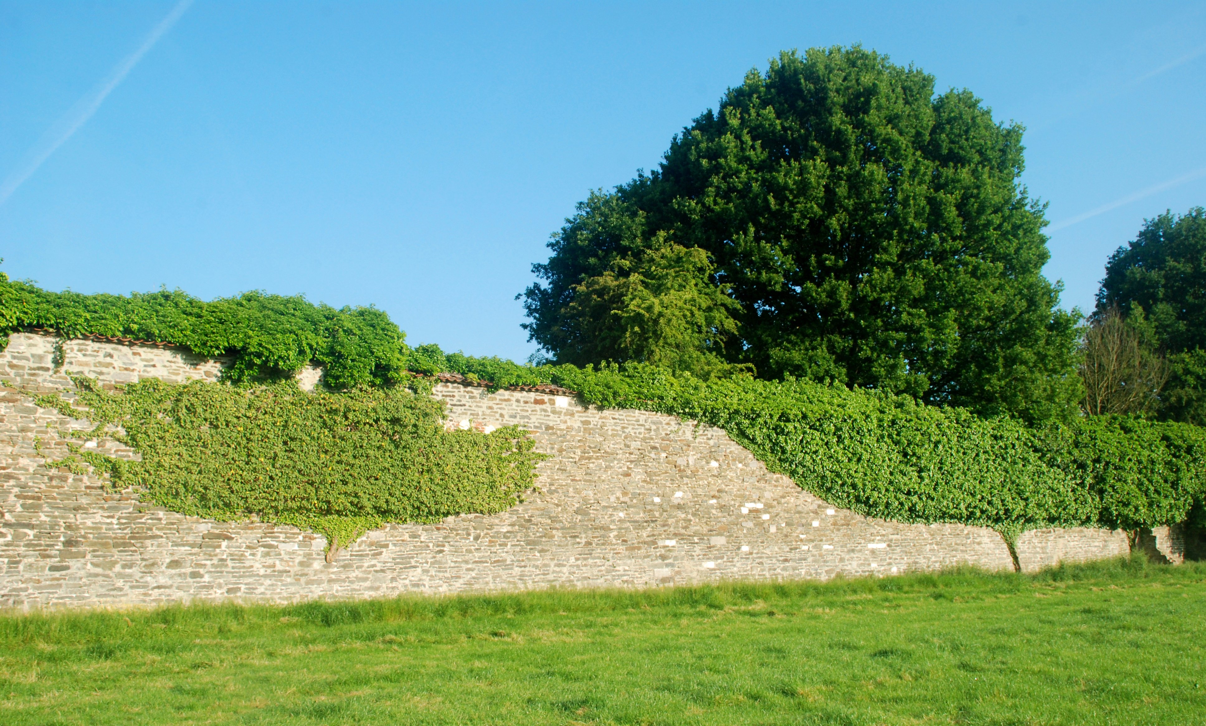 Belgique - Brabant wallon - Mur d'enceinte de l'abbaye de Villers-la-Ville - Côté intra-muros